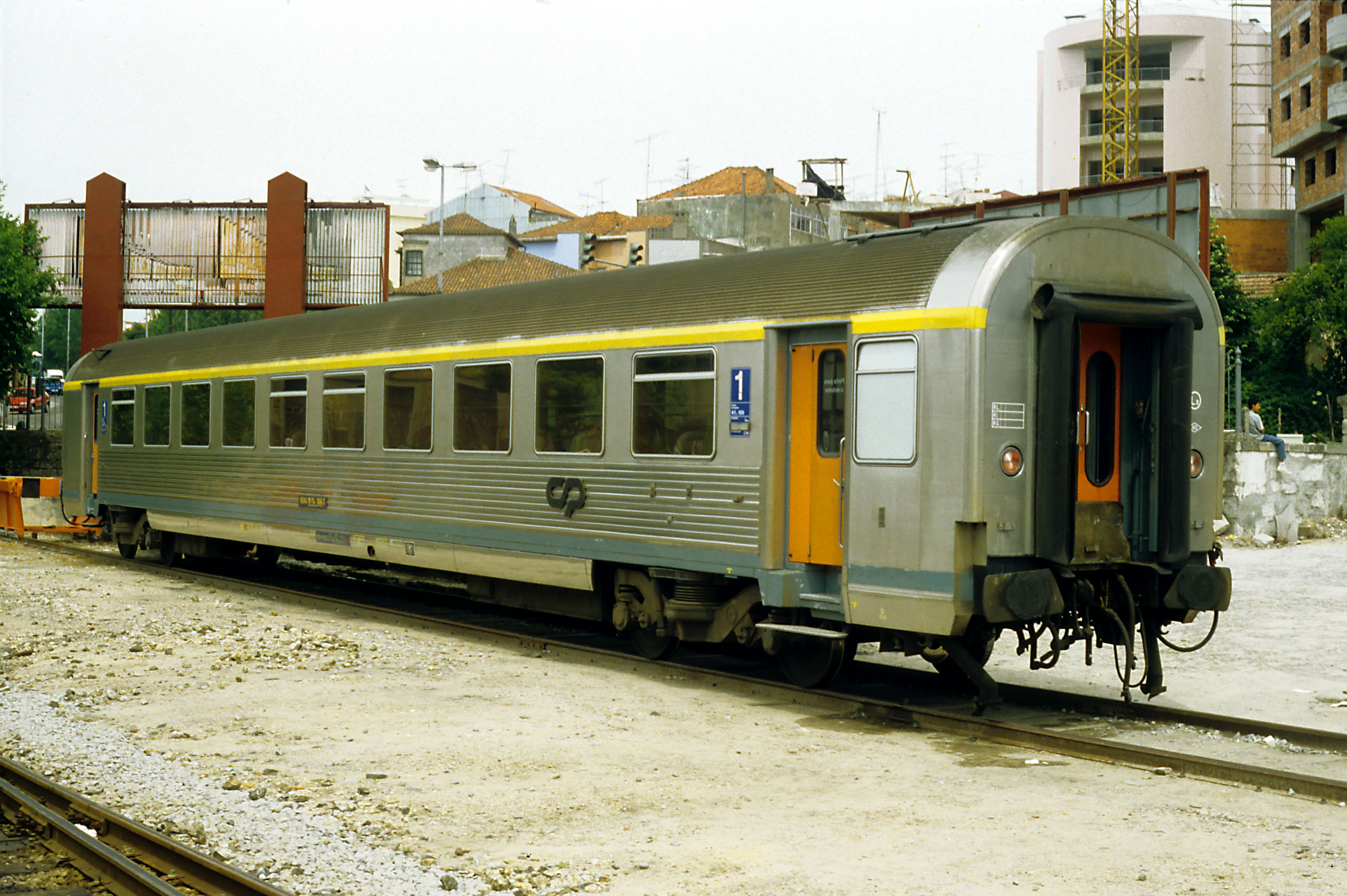 Corail-Wagen der CP mit dem für Portugal typischen rostfreien Wagenkasten. Der Wagen ist nur für den Binnenverkehr zugelassen und trotzdem mit den breiten Originalpuffern für den Wechselverkehr zwischen der iberischen Halbinsel und dem europäischen Regelspurnetz ausgerüstet.